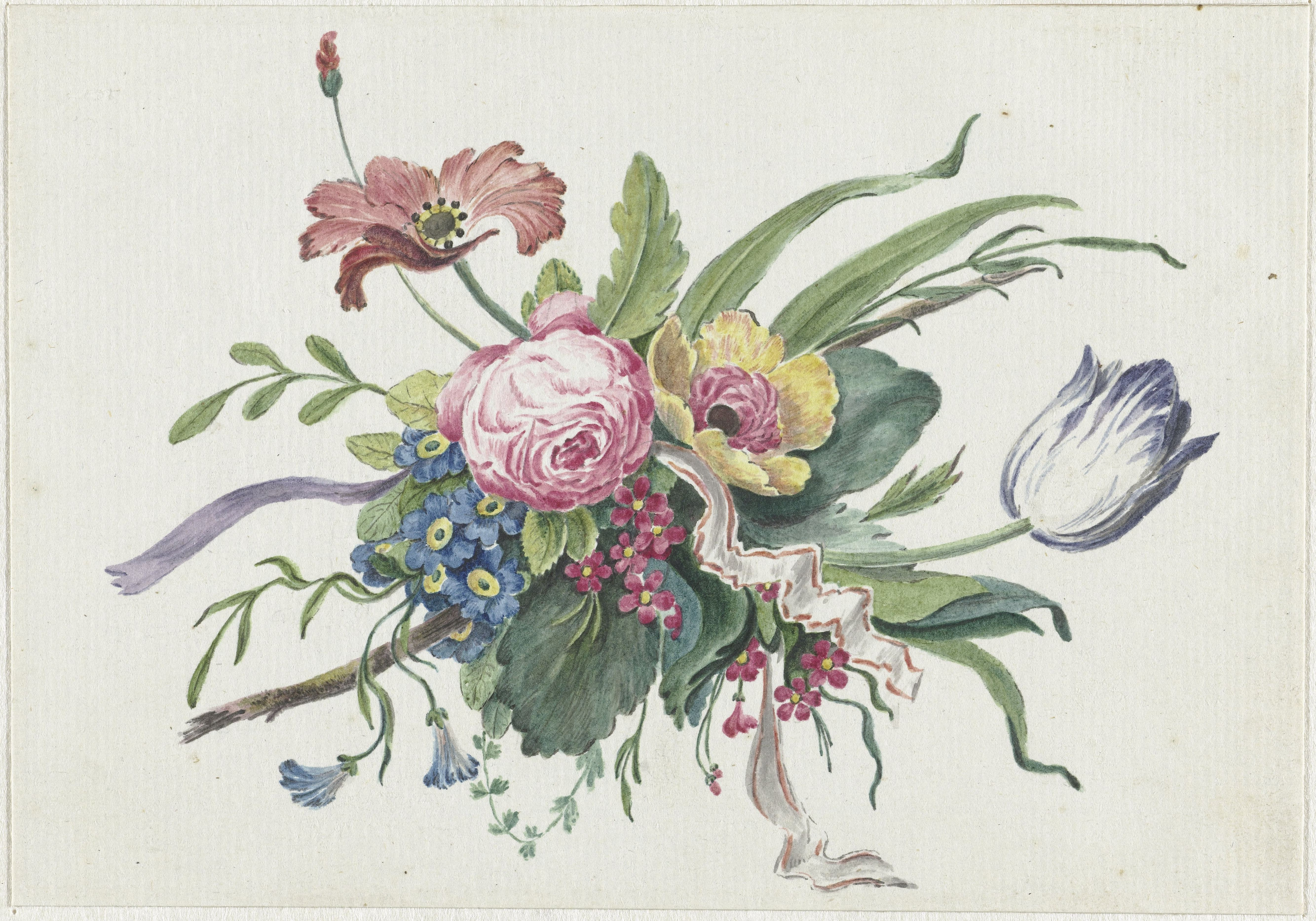 IdentificatieTitel(s): BloemstukObjecttype: tekening aquarel Objectnummer: RP-T-00-861VervaardigingVervaardiger: tekenaar: Catharina Wilhelmina SchweickhardtDatering: 1809Fysieke kenmerken: penseel in aquarelMateriaal: papier waterverf Techniek: penseelAfmetingen: h 116 mm × b 165 mmOnderwerpWat: still life of plants, flowers and fruitVerwerving en rechtenVerwerving: onbekendCopyright: Publiek domein